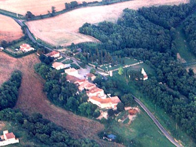 Photo aérienne du village de Labrihe. Alain ROBERT